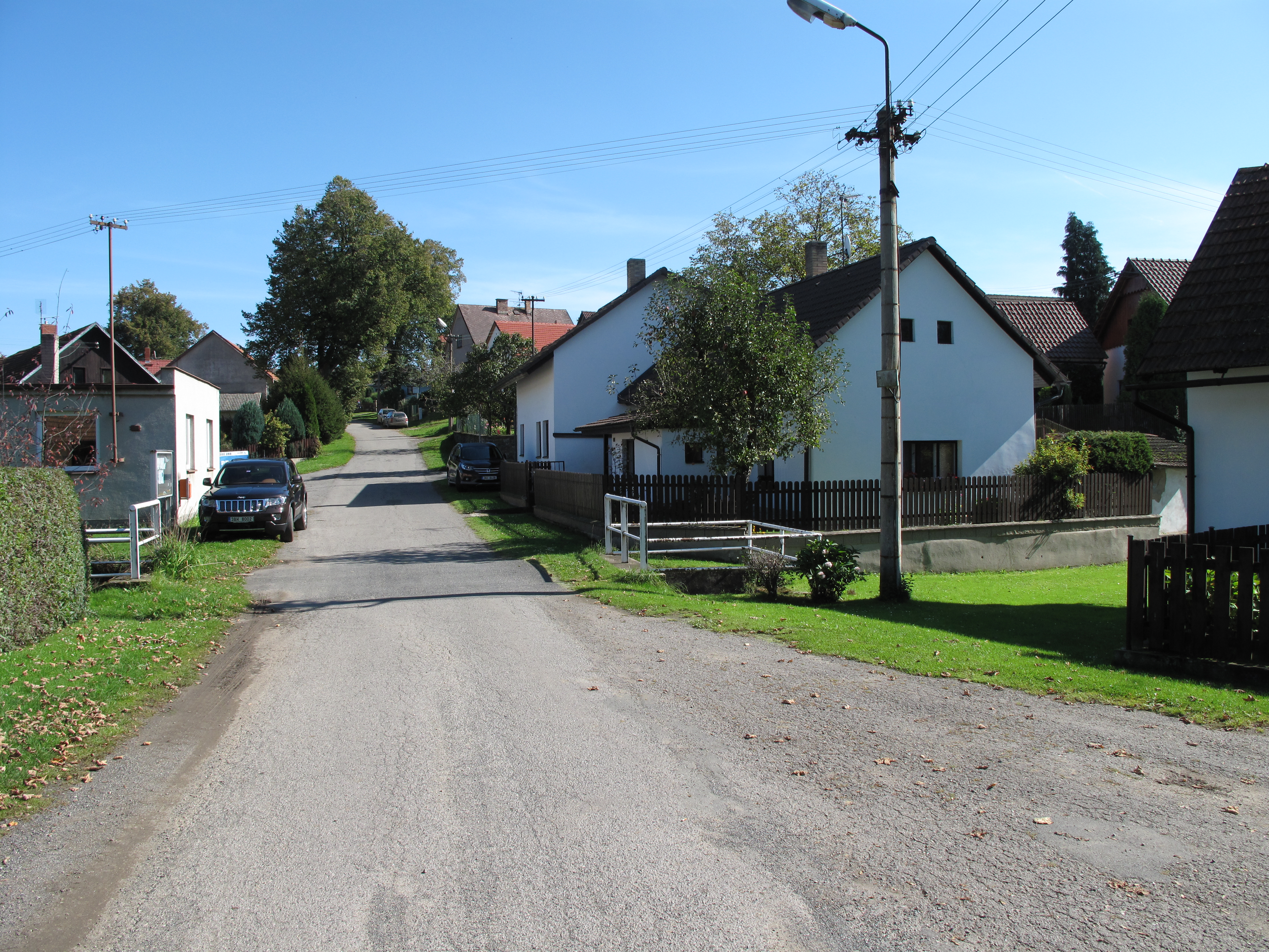 Na návsi v Podvekách. Okres Benešov, Česká republika.